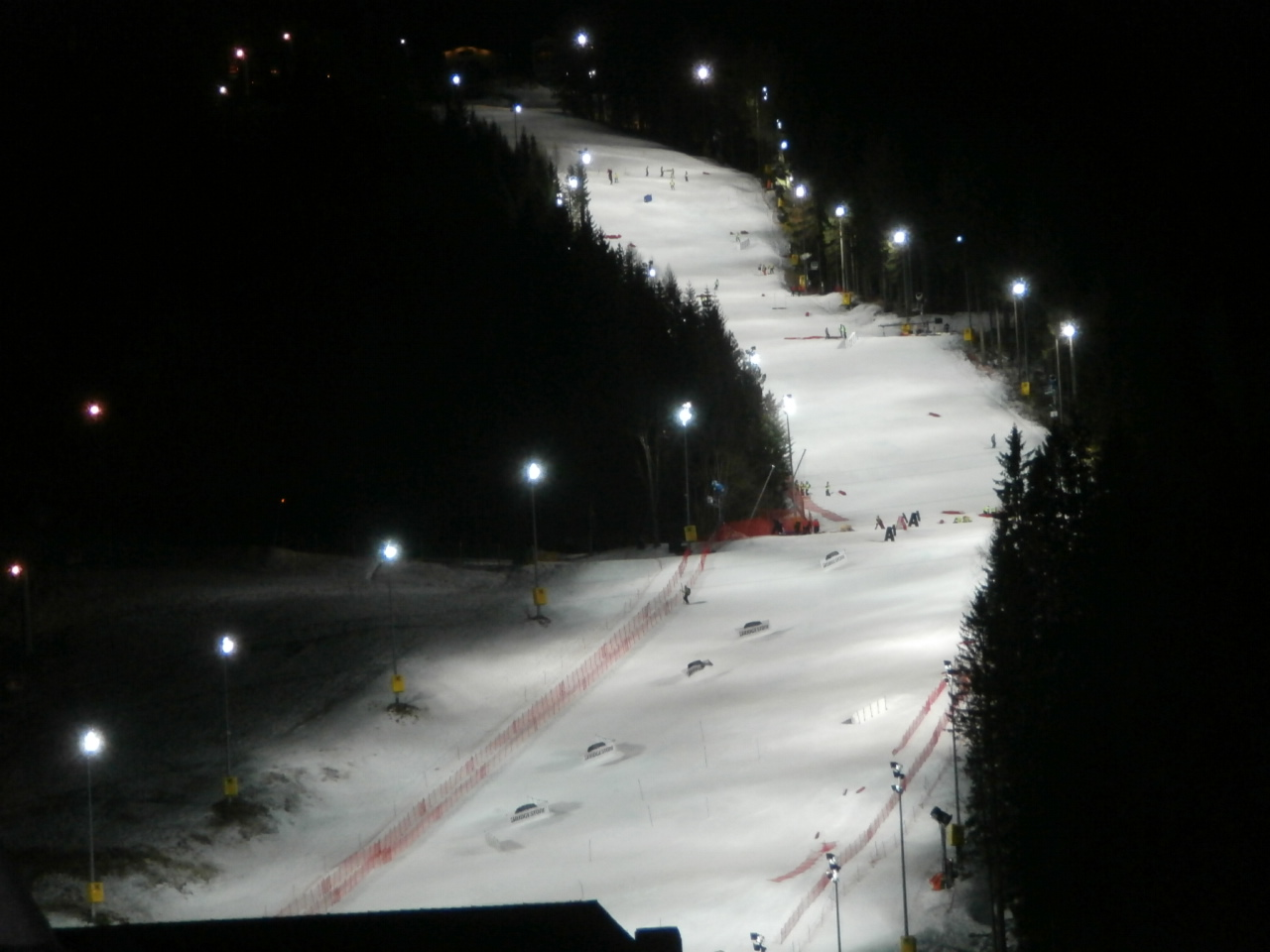 Hirschenkogel während eines FIS-Events 2012